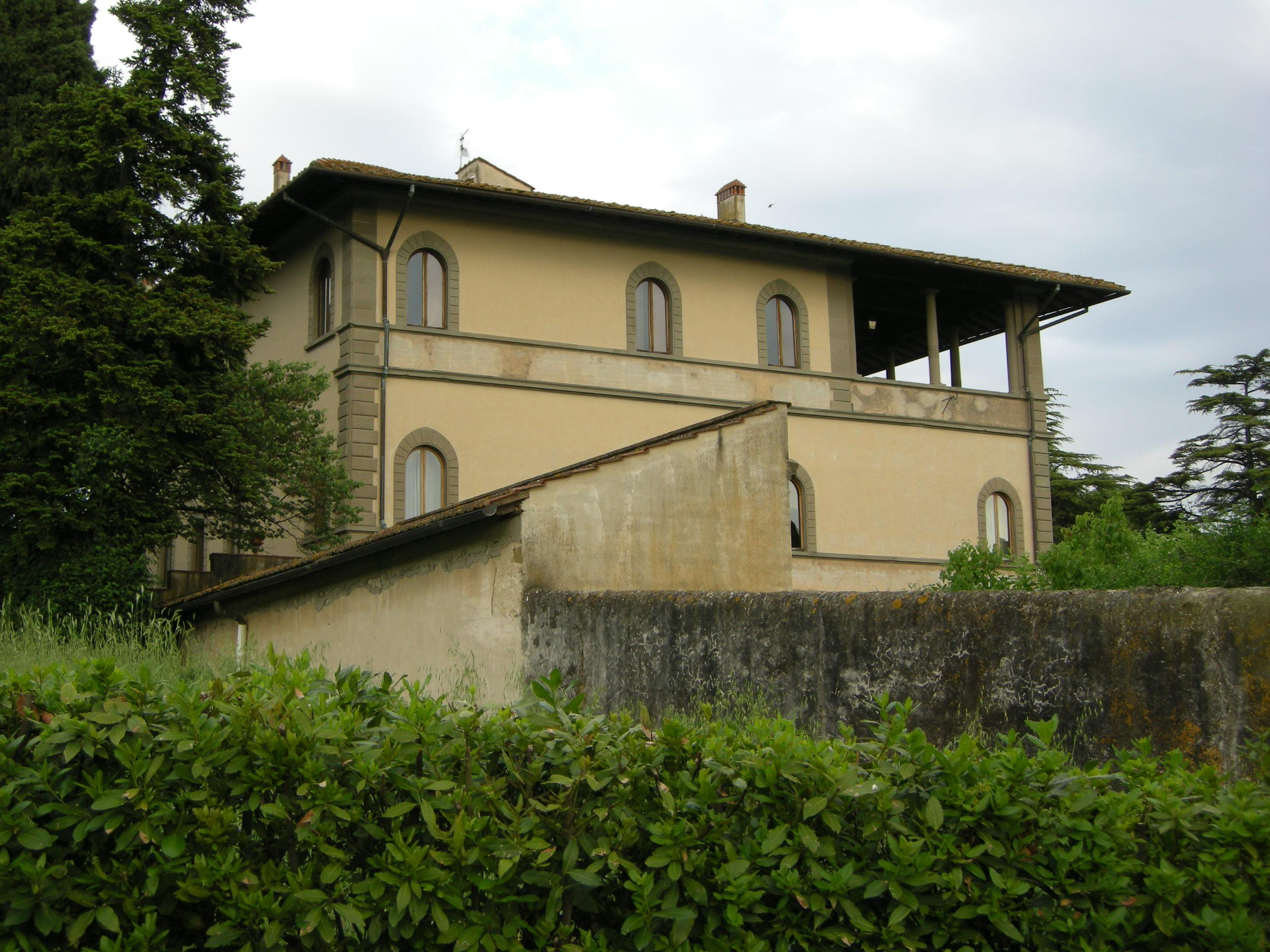 Villa di montegirone